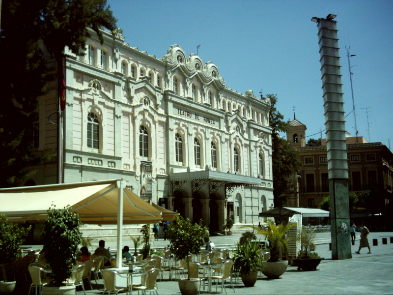 Teatro Romea en Murcia